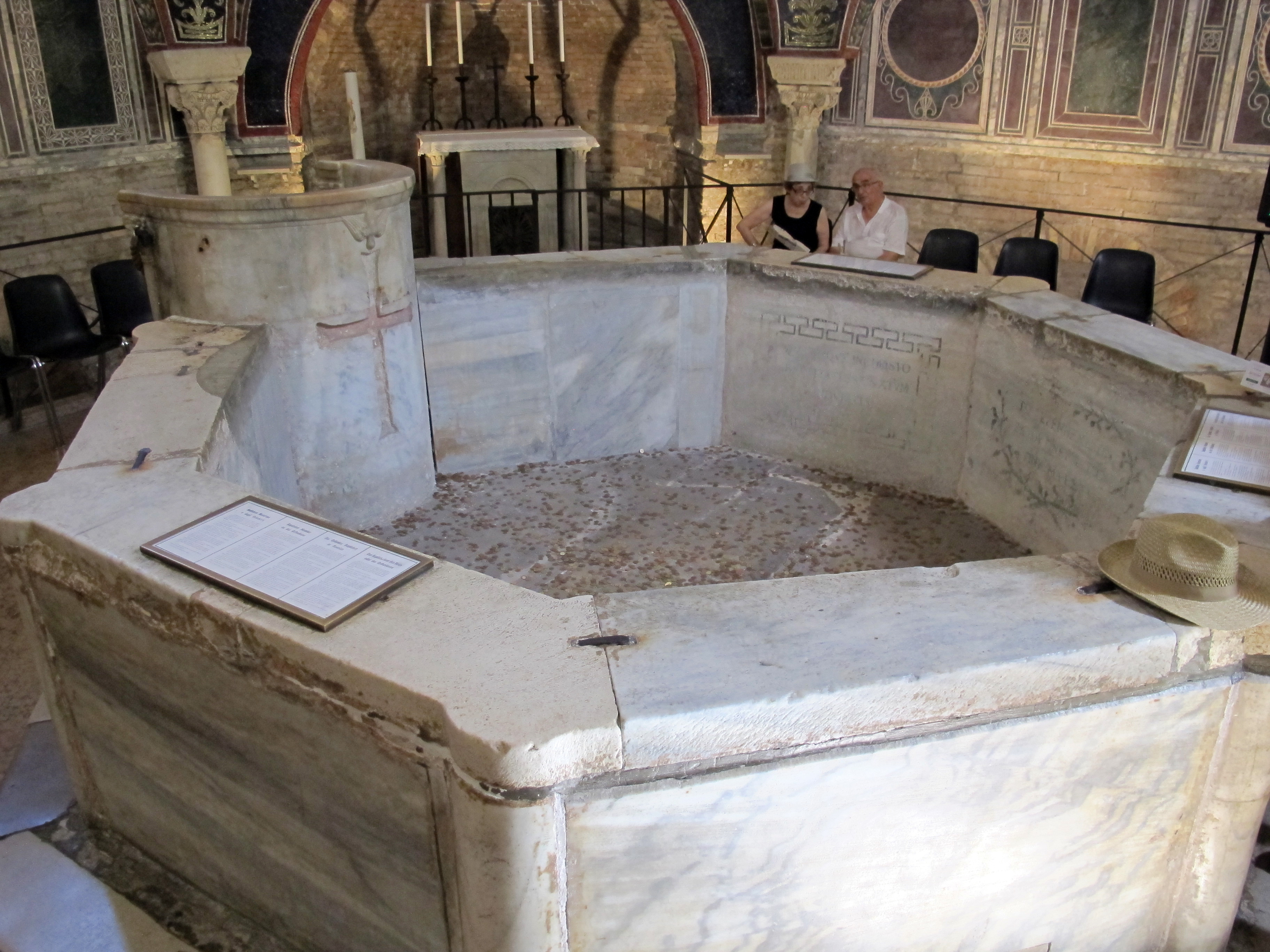 Battistero Neoniano - MIBAC This is a photo of a monument which is part of cultural heritage of Italy.